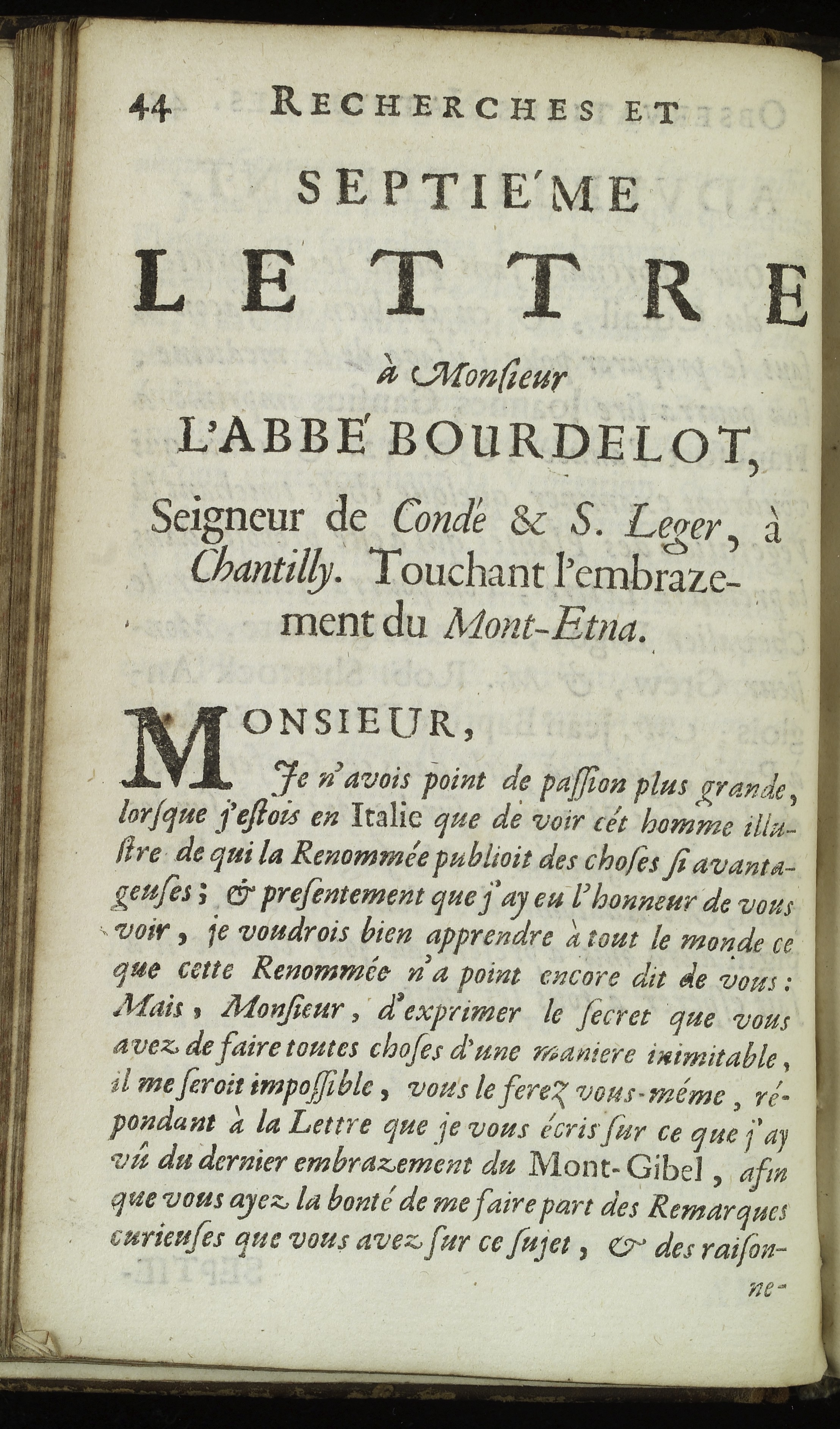 Photo showing text from Septieme Lettre a Monsieur L'abbe Bourdelot, Seignor de Conde et S. Leger, a Chantilly. Touchant l'embrazement du Mont-Etna (Letter concerning an eruption of Mount Etna). Title of book: Recherches et observations naturelles de Monsieur Boccone ... touchant le corail, la pierre etoilée, les pierres de figure de coquilles, la corne d'ammon, l'astroïte undulatus, les dents de poissons pétrifiées, les herissons alterez, l'embrasement du mont Etna, la sangsüe du Xiphias, l'alcyonium stupposum, le bezoar mineral & les plantes qu'on trouve dans la Sicile, avec quelques reflexions sur la vegetation des plantes : examinées à diverses fois dans l'Assemblée de messieurs de Société Royale de Londres, et conferences dans les de Monsieur l'Abbe Bourdelot à Paris / [Paolo Boccone]. Published 1674. Wellcome Images Keywords: Italy; Natural History; Book; Etna; Volcano; Books